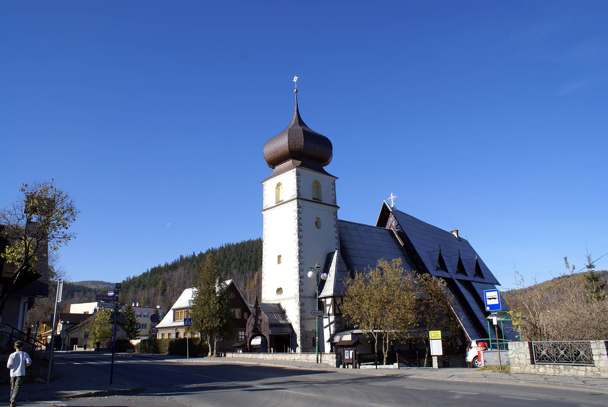 Karpacz, miasto, XIX/XX